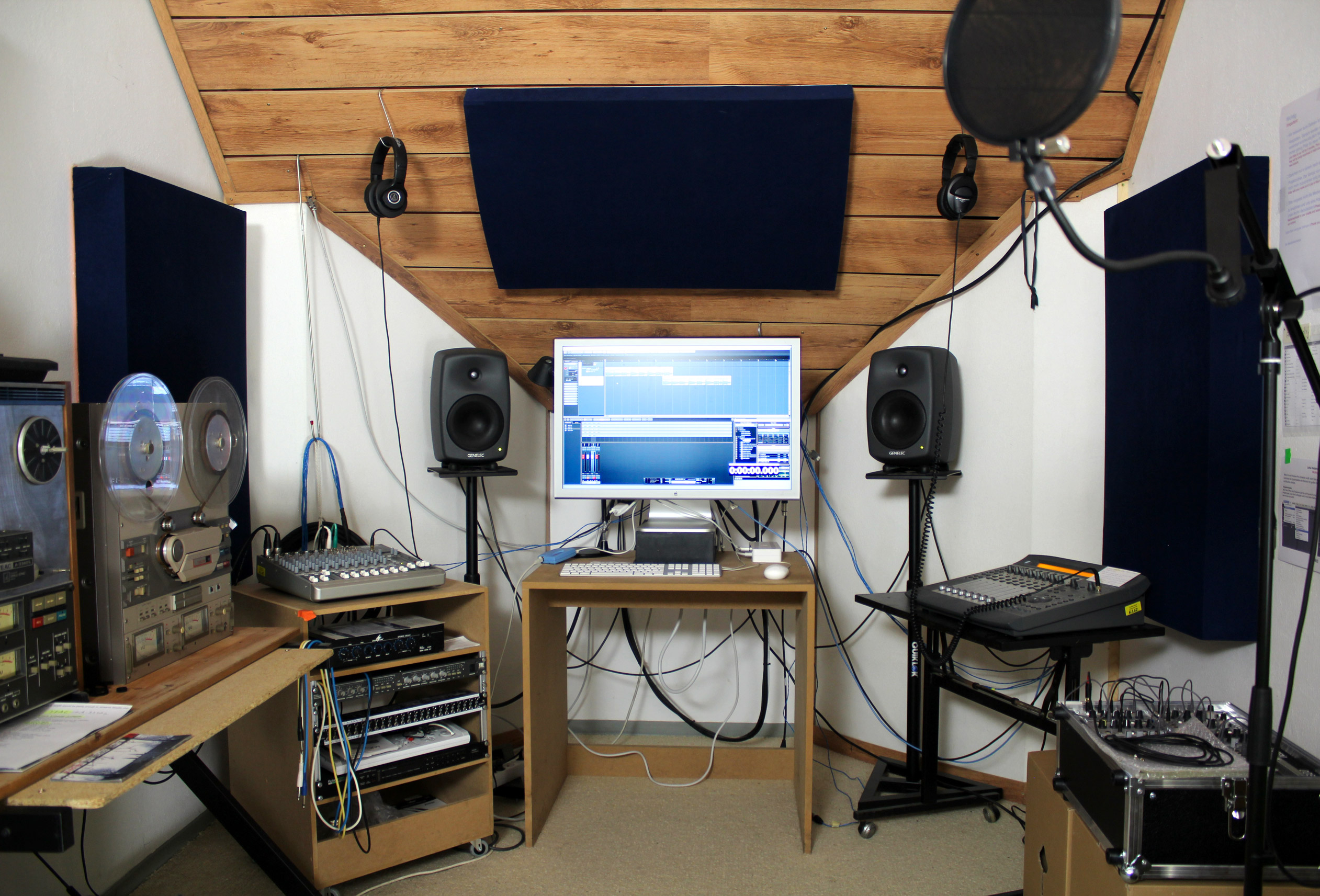 Medienwerkstatt Berlin im Künstlerhaus Bethanien in Berlin-Kreuzberg, Audiostudio.